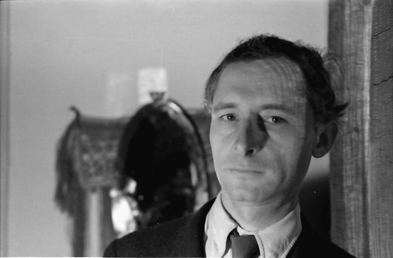 Bukarest: Willy Pragher bei Magdalena [Radulescu]